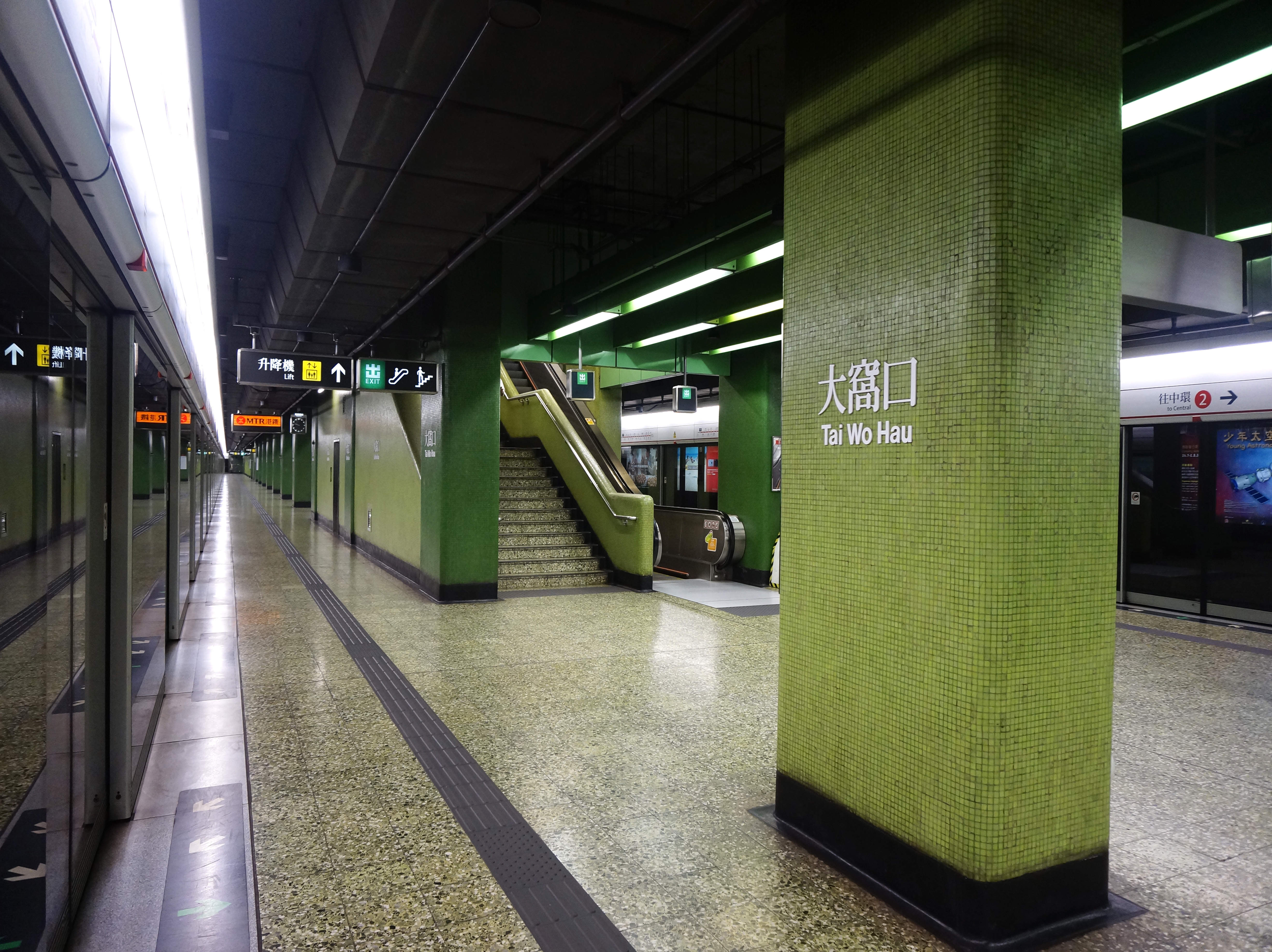 港鐵大窩口站月台